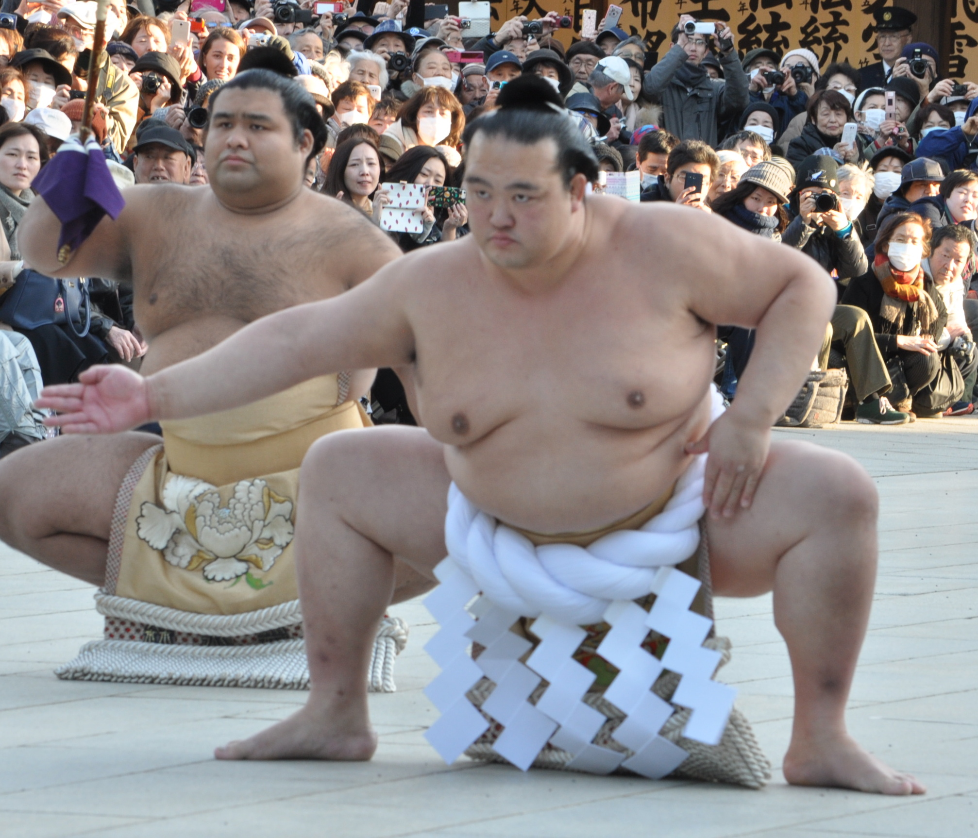 横綱推挙式 奉納土俵入り